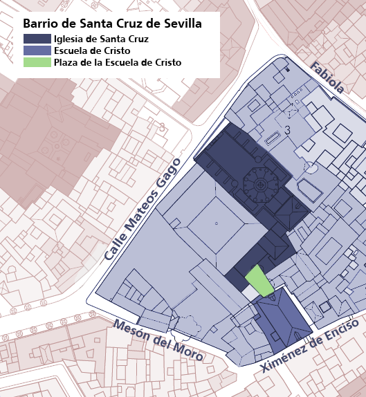 Mapa parcial del Barrio de Santa Cruz. Detalle de localización de la Iglesia de Santa Cruz, Escuela de Cristo, y Plaza de la Escuela de Cristo